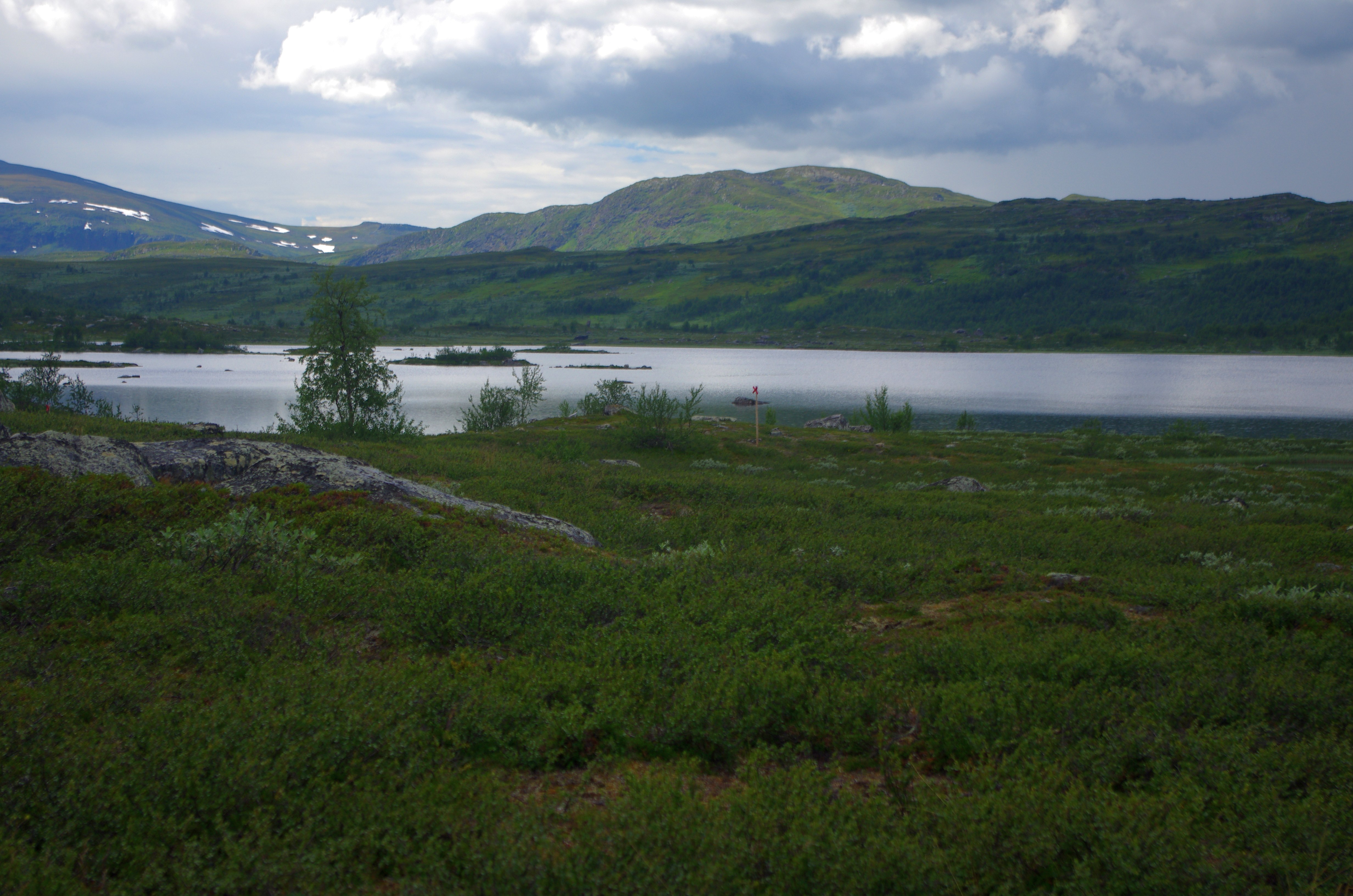 Suolojaure (Suoluojávrrie) en sjö i Arjeplogs kommun i Lappland i Sverige.